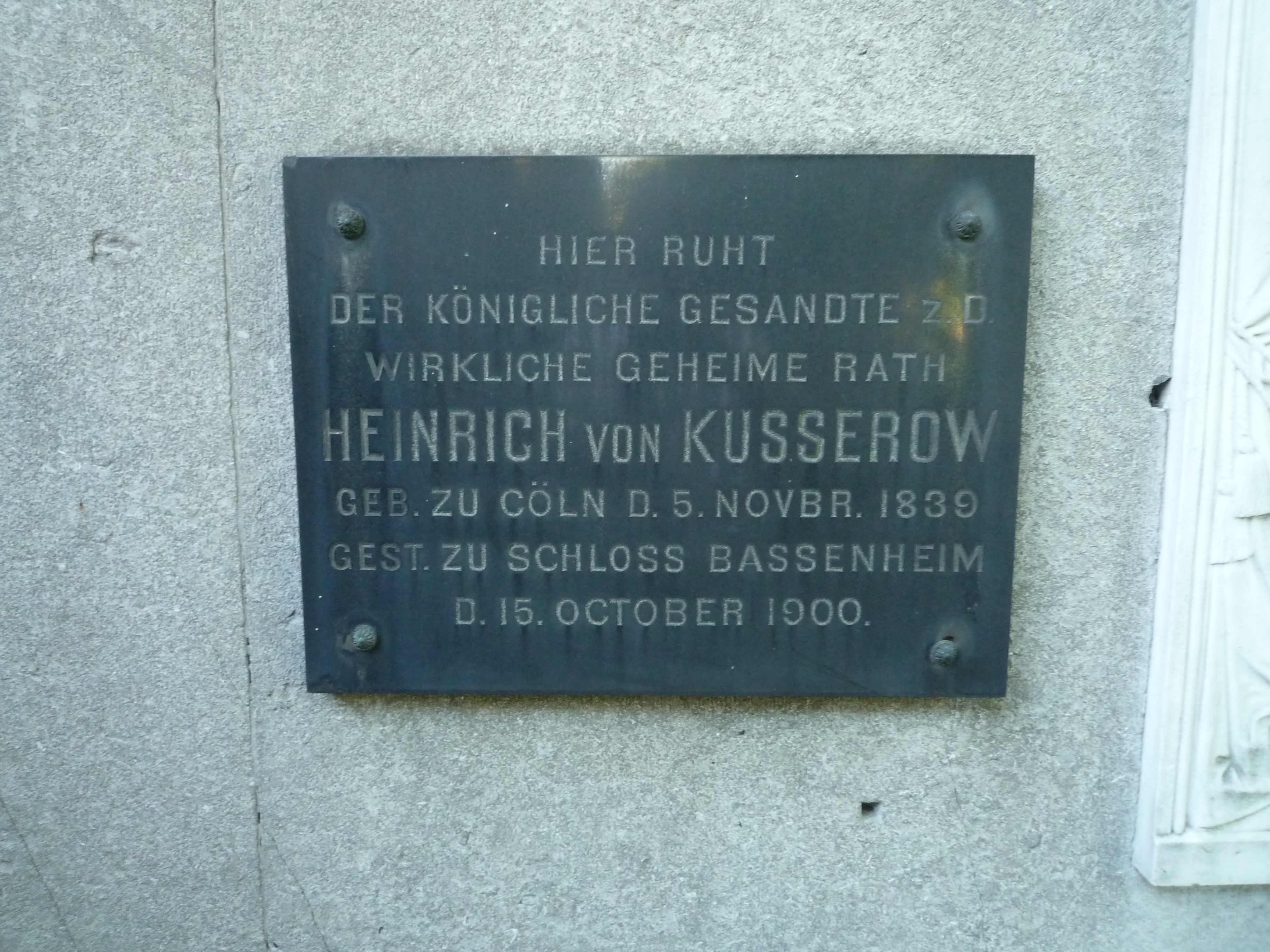 Alter St.-Matthäus-Kirchhof Berlin, Grabtafel Heinrich von Kusserow / Foto: Wolfgang Schindler